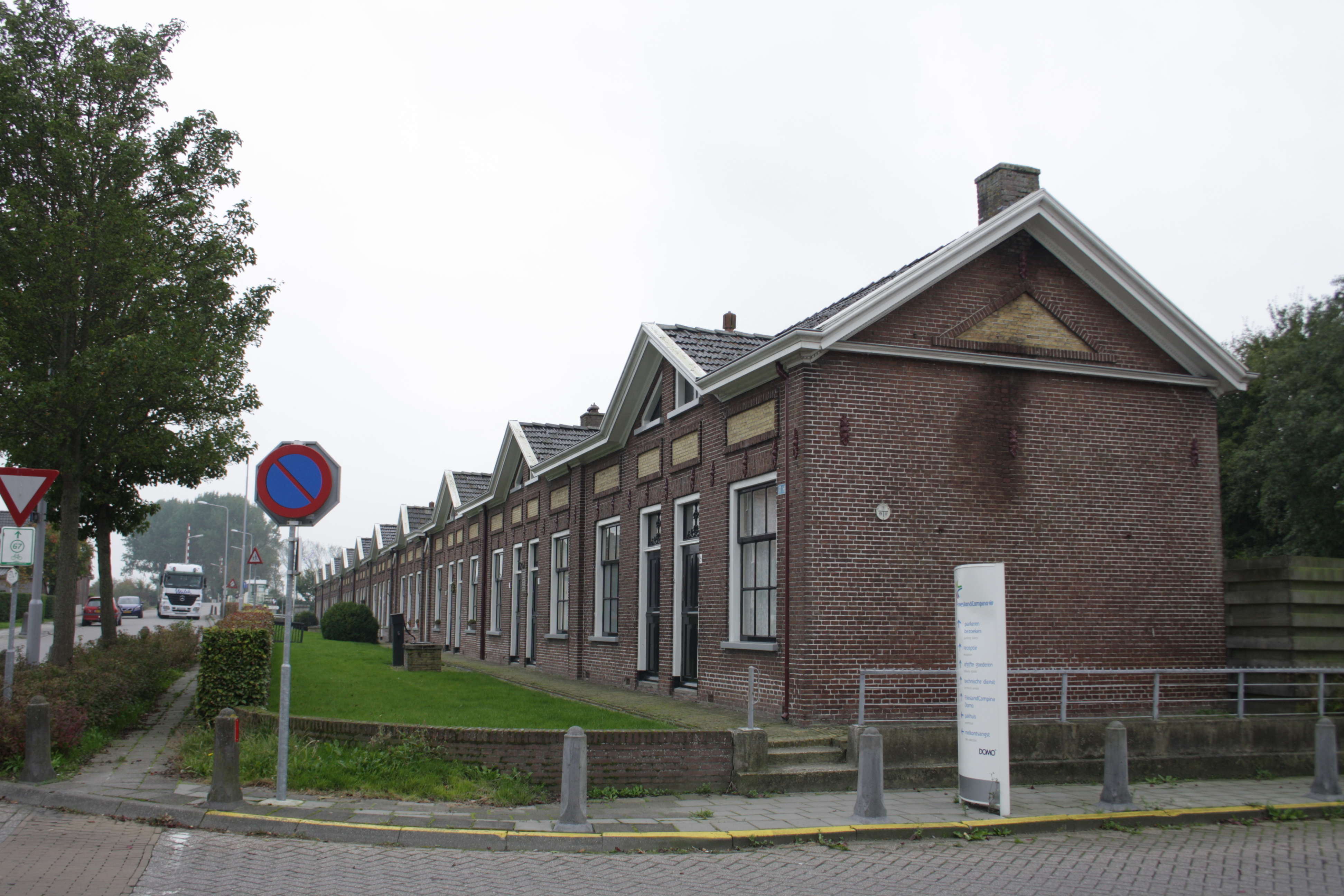 Dronrijp, Friesland. Gasthuis Vredenhof, uitbreiding